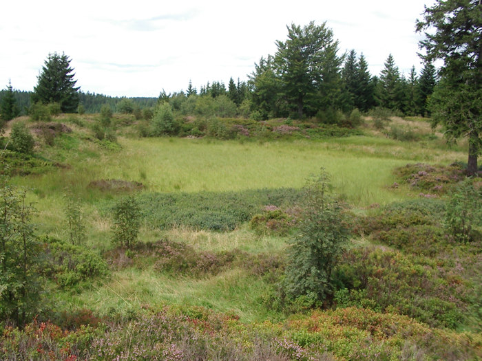 Röschenschanze Bild 3